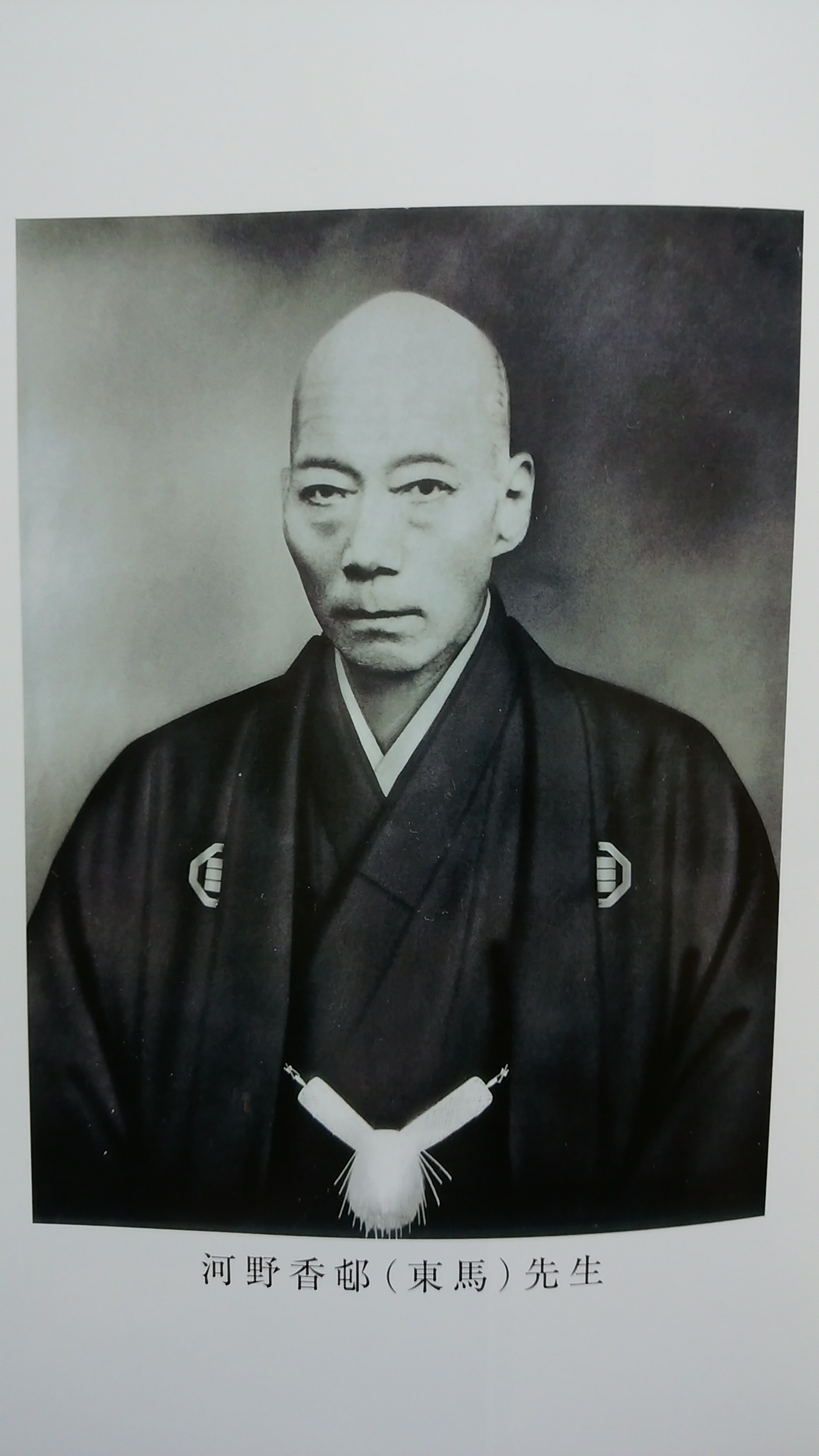 河野東馬写真